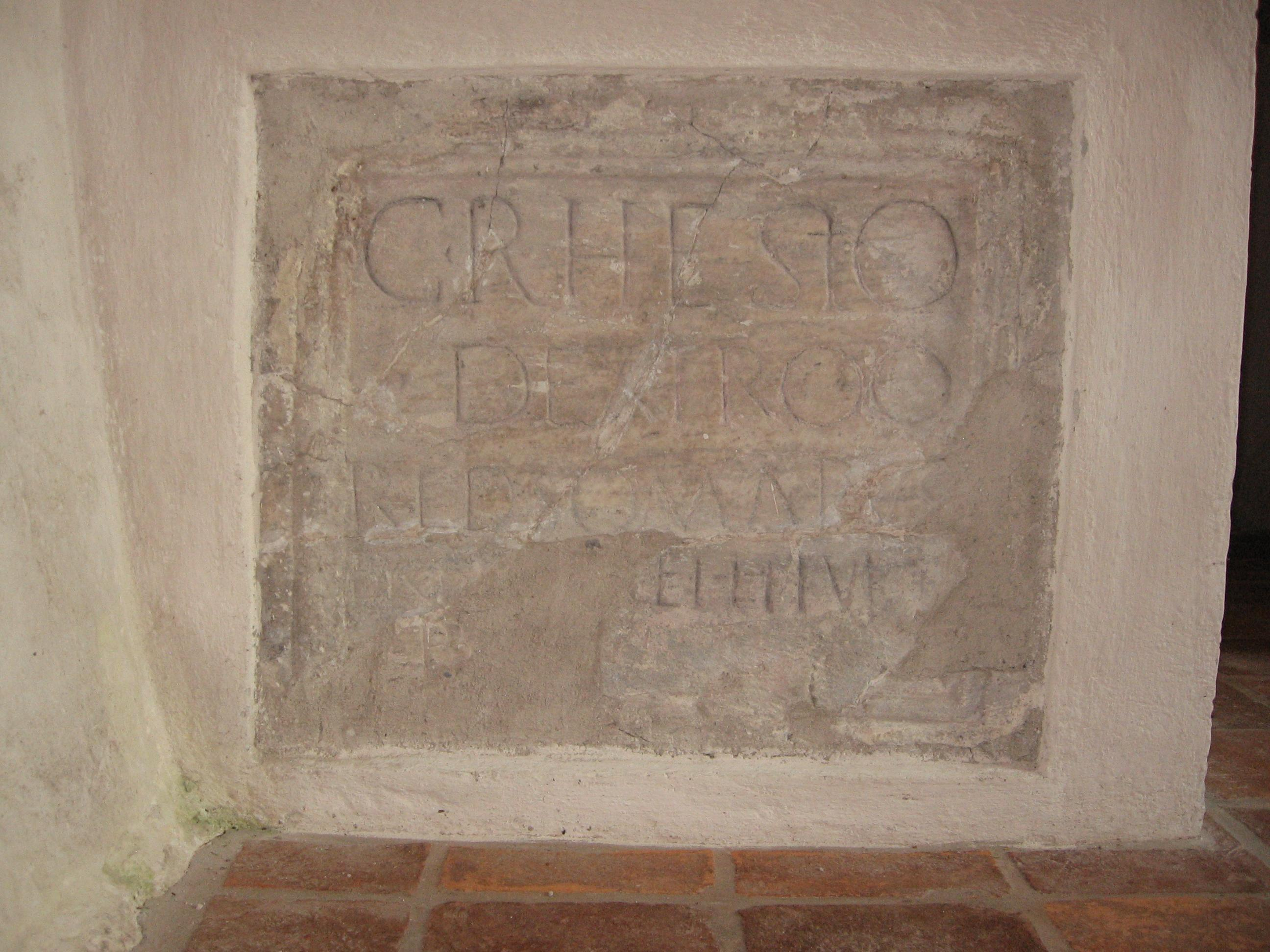 Celtic inscription inside Saint George church on Danielsberg.